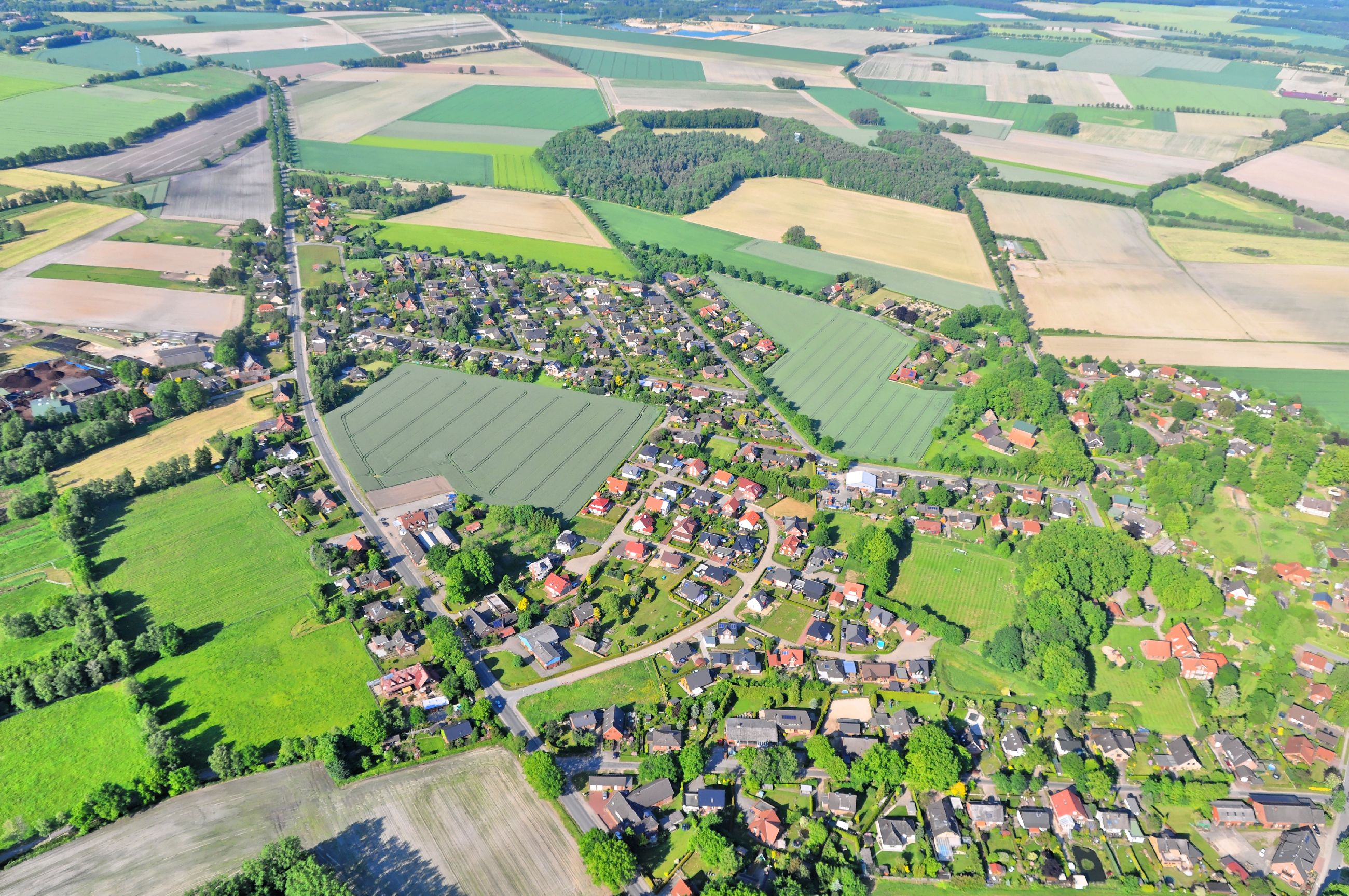 Überführungsflug vom Flugplatz Nordholz-Spieka über Lüneburg, Potsdam zum Flugplatz Schwarzheide-Schipkau